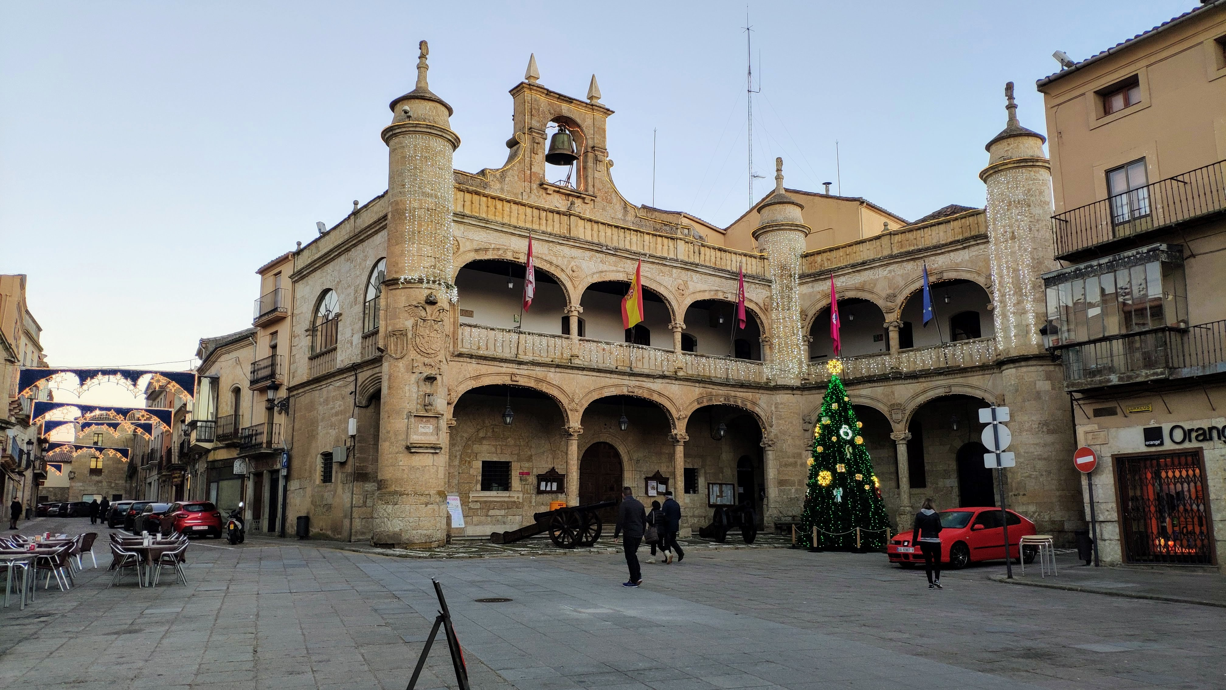 Ayuntamiento de Ciudad Rodrigo, Salamanca